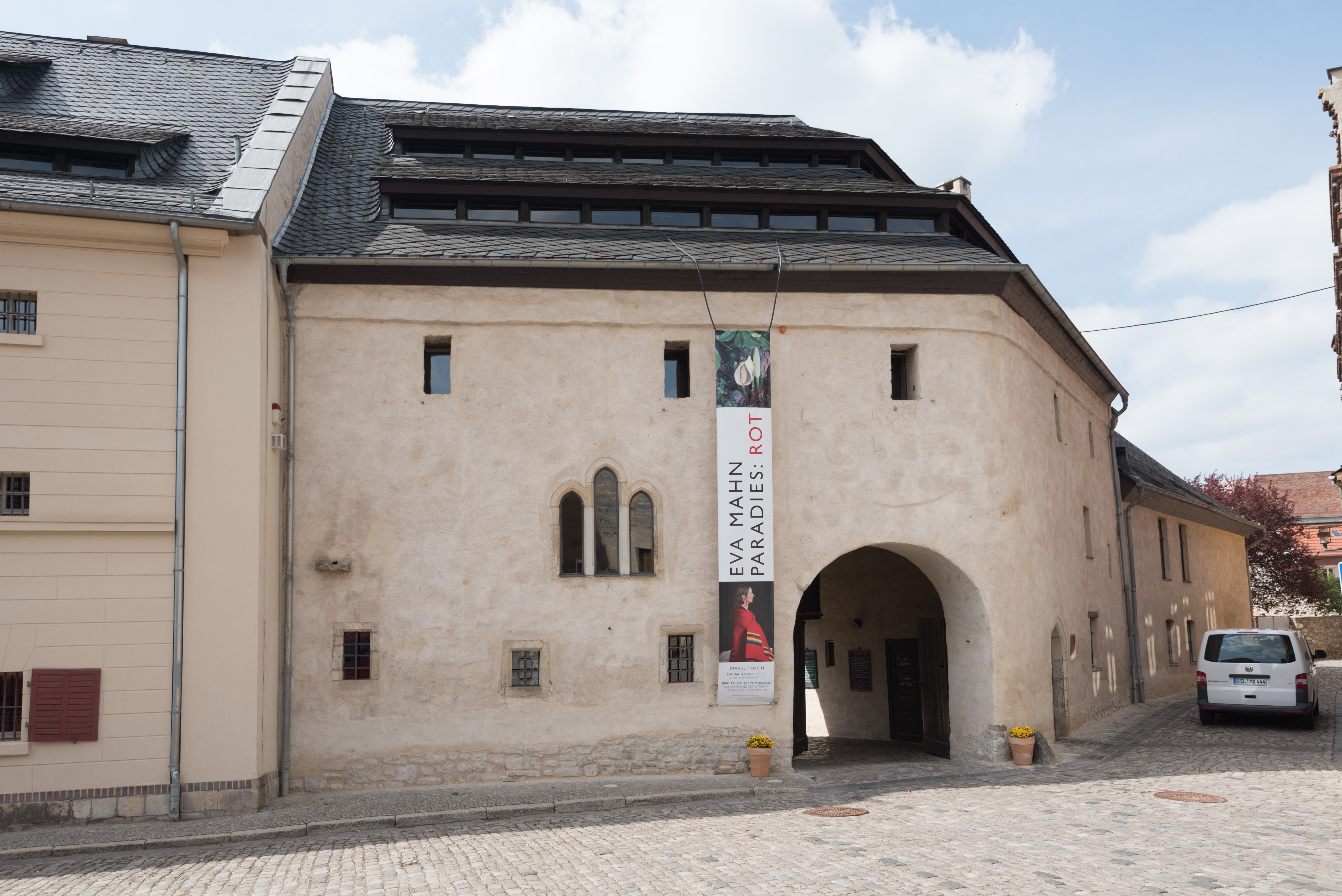 Aschersleben, Am Grauen Hof 1